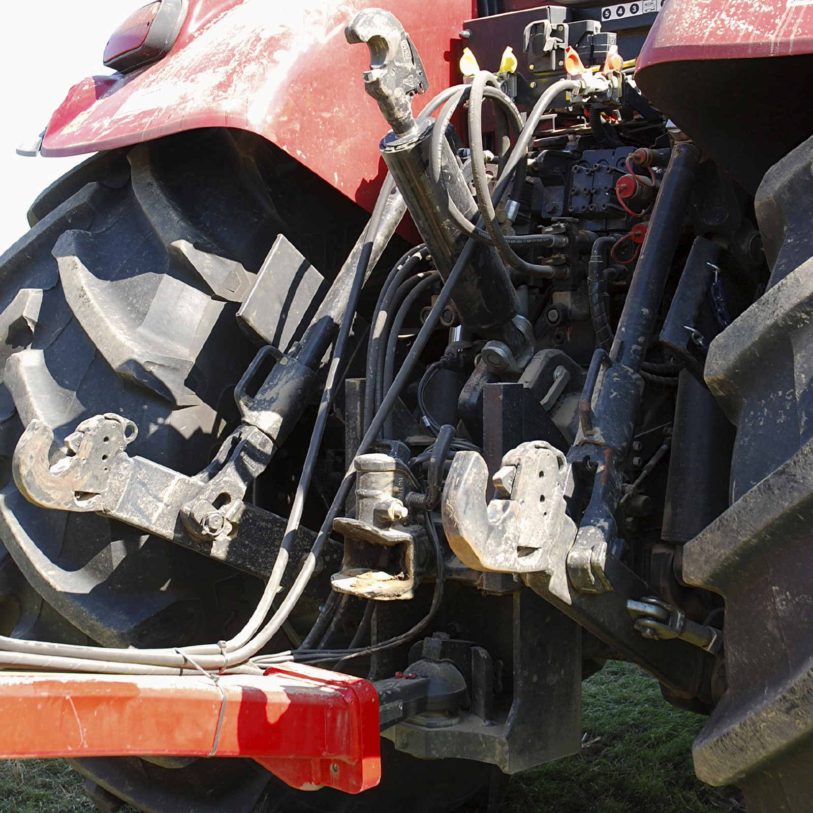 Fanghaken (Schnellkuppler) der Kategorie 3 an den beiden Unterlenkern und am Oberlenker des Heckhubwerks (Dreipunkthydraulik) eines Case-IH-Traktors Puma 225 CVX; mittig zwischen den Unterlenkern eine Bolzenkupplung im „offenen“ Zustand; das Gerät ist mit einer Kugelkopfkupplung K 80 an den Traktor gekuppelt.